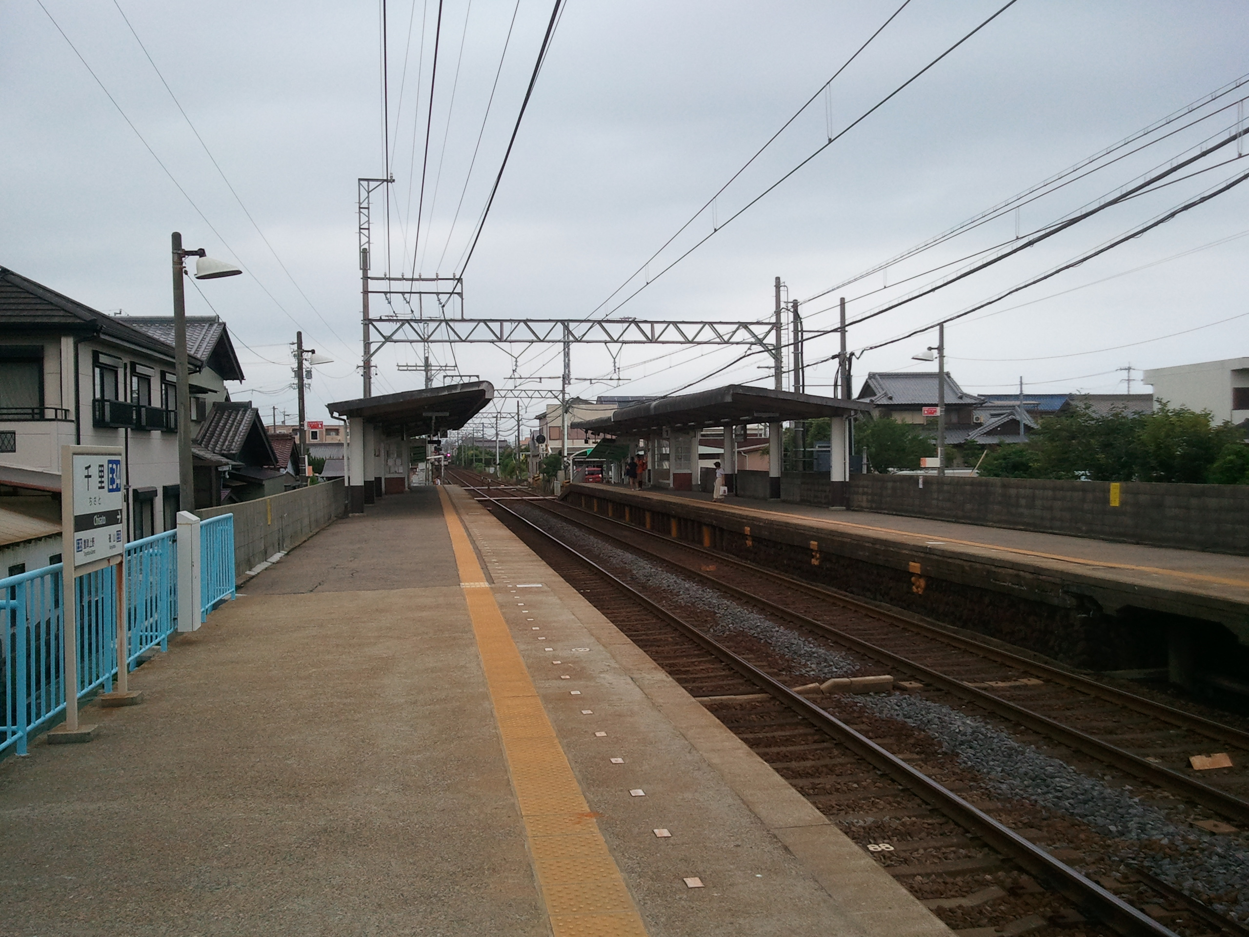 千里駅プラットホーム